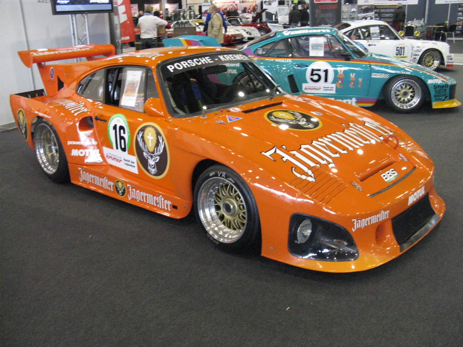 Porsche 935 Turbo K3 Kremer Racing